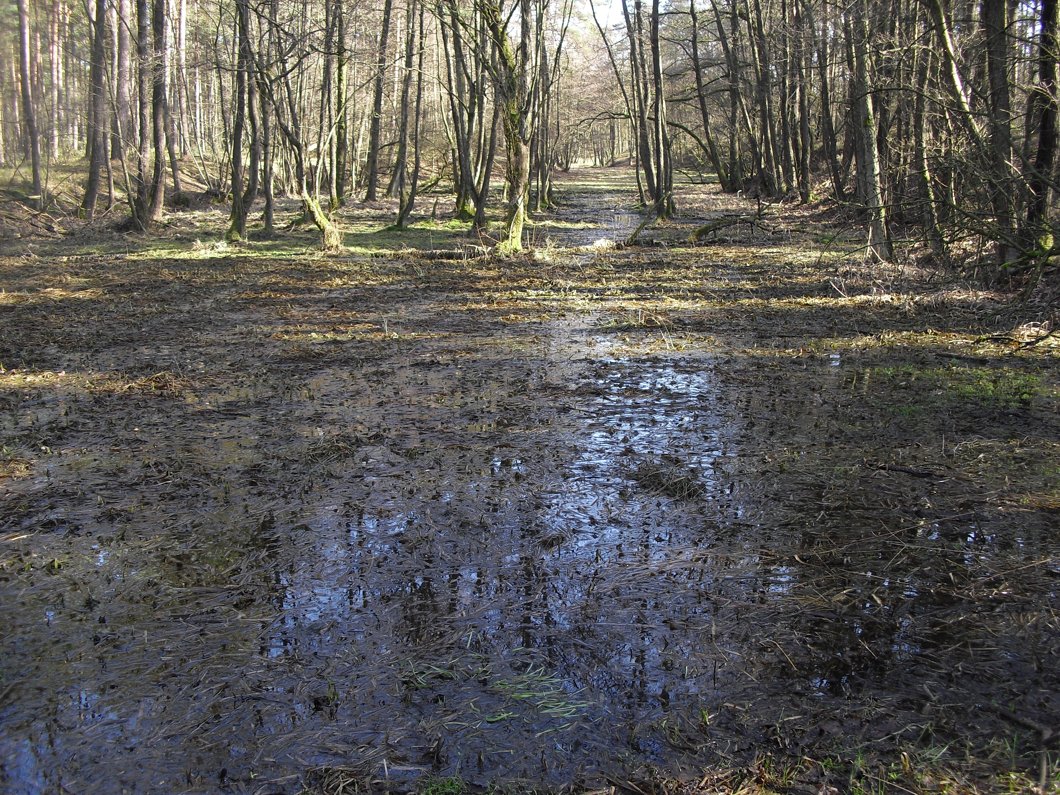 "Rosenlake", Quellgebiet des Holtebaches in der Moosheide.